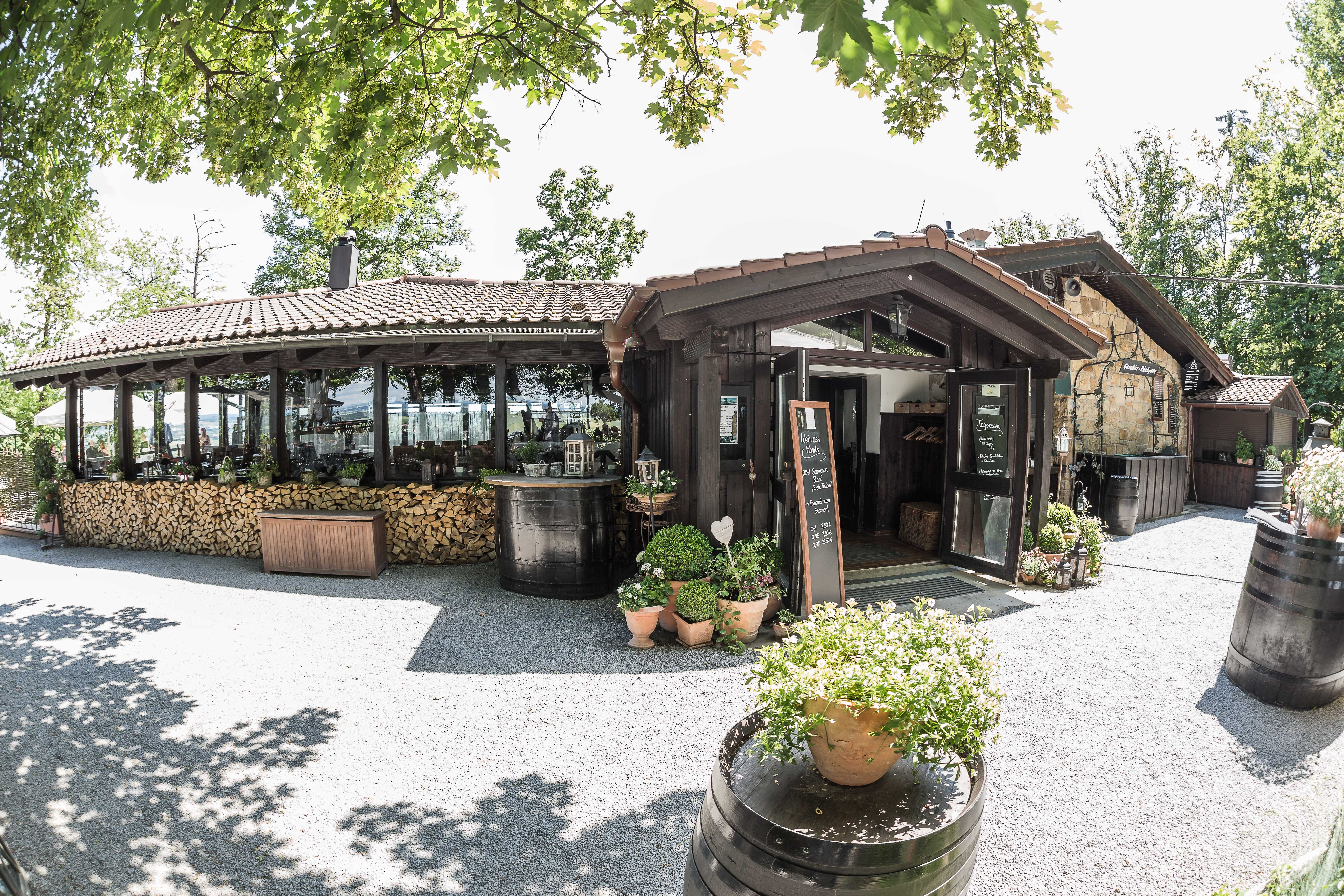 Hier ist das Gebäude des bekannten Restaurants "Heuchelberger Warte" zu sehen